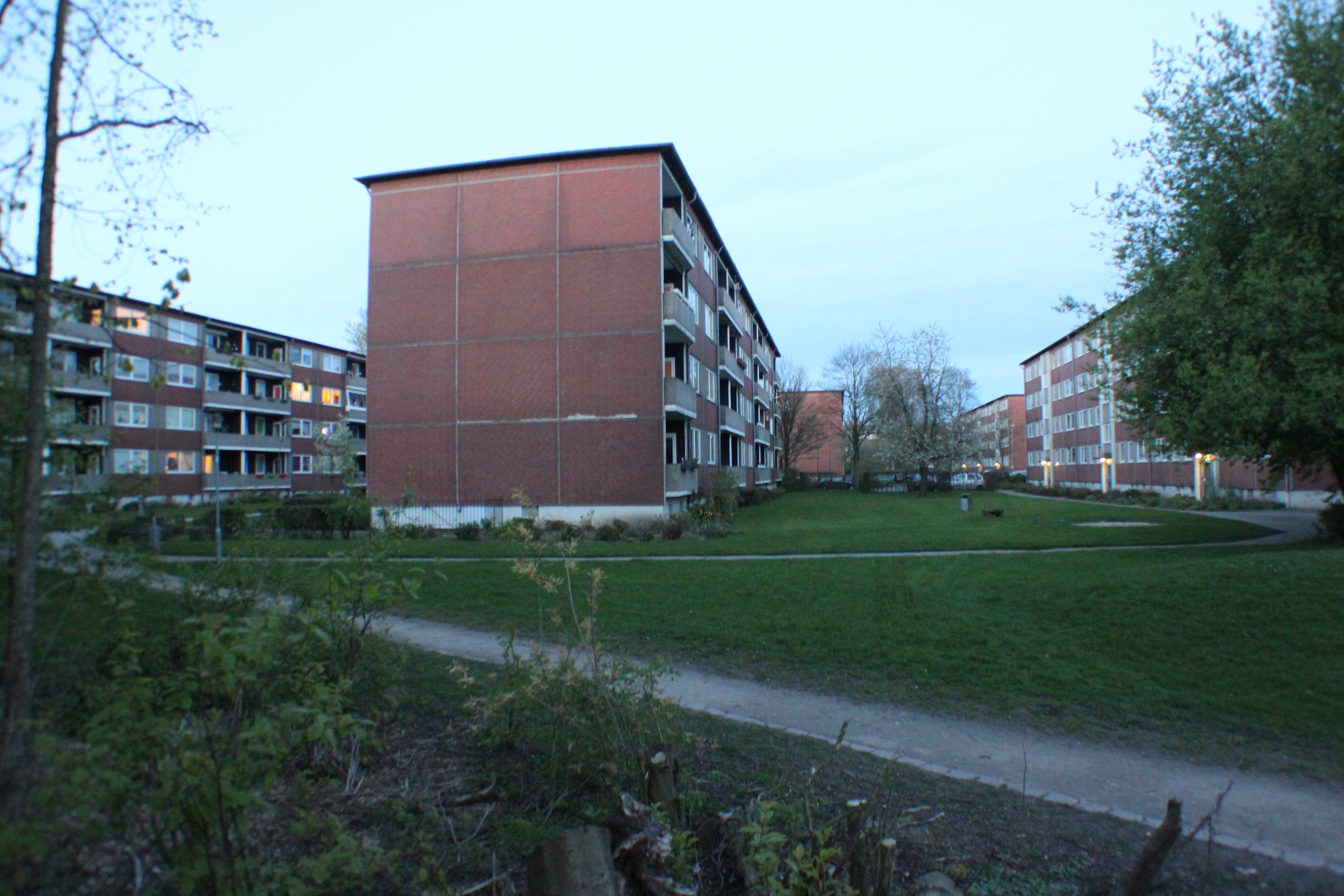 Musikerviertel Flensburgs 2014-04-16, Bild 04